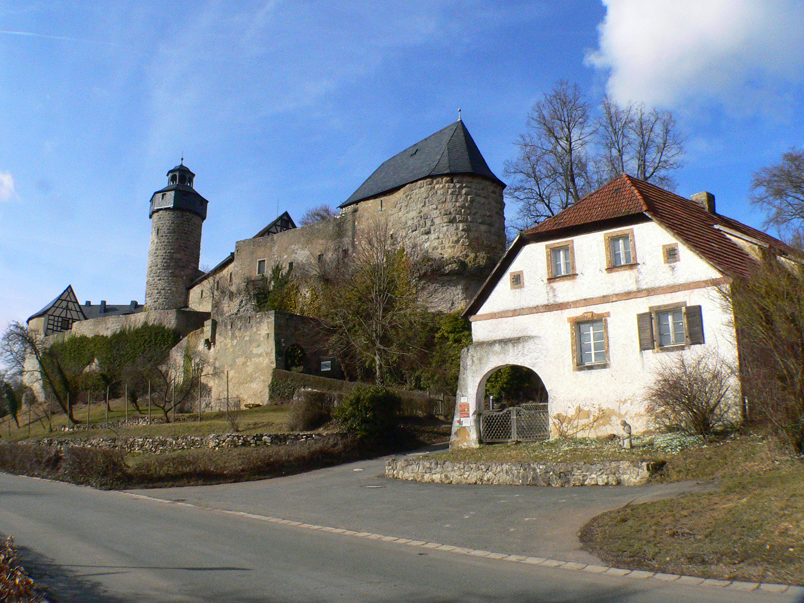 Burg Zwernitz Südwestansicht, Wonsees-Sanspareil, Fränkische Schweiz, Bayern